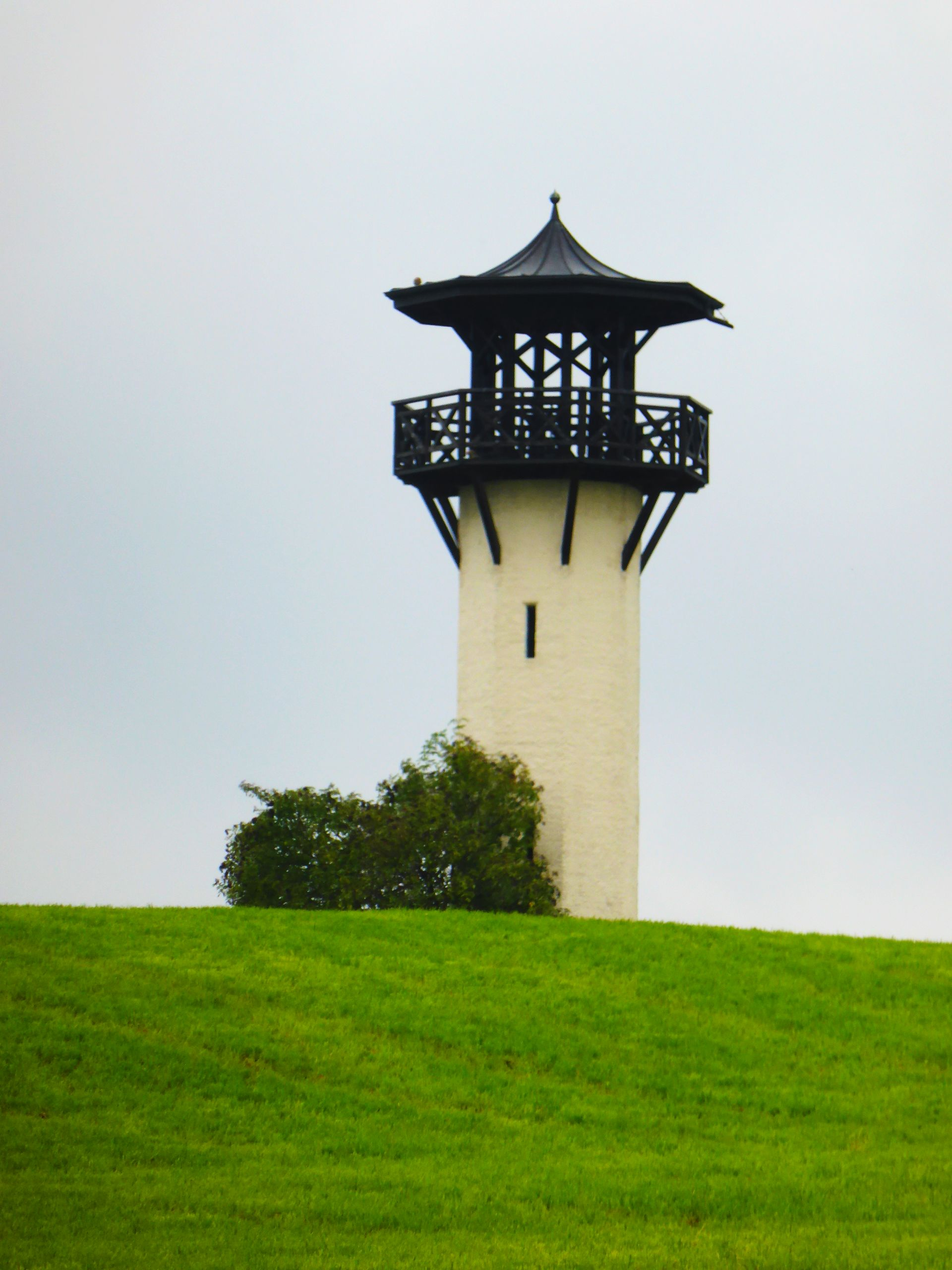 Wasserturm bei Weikertsham